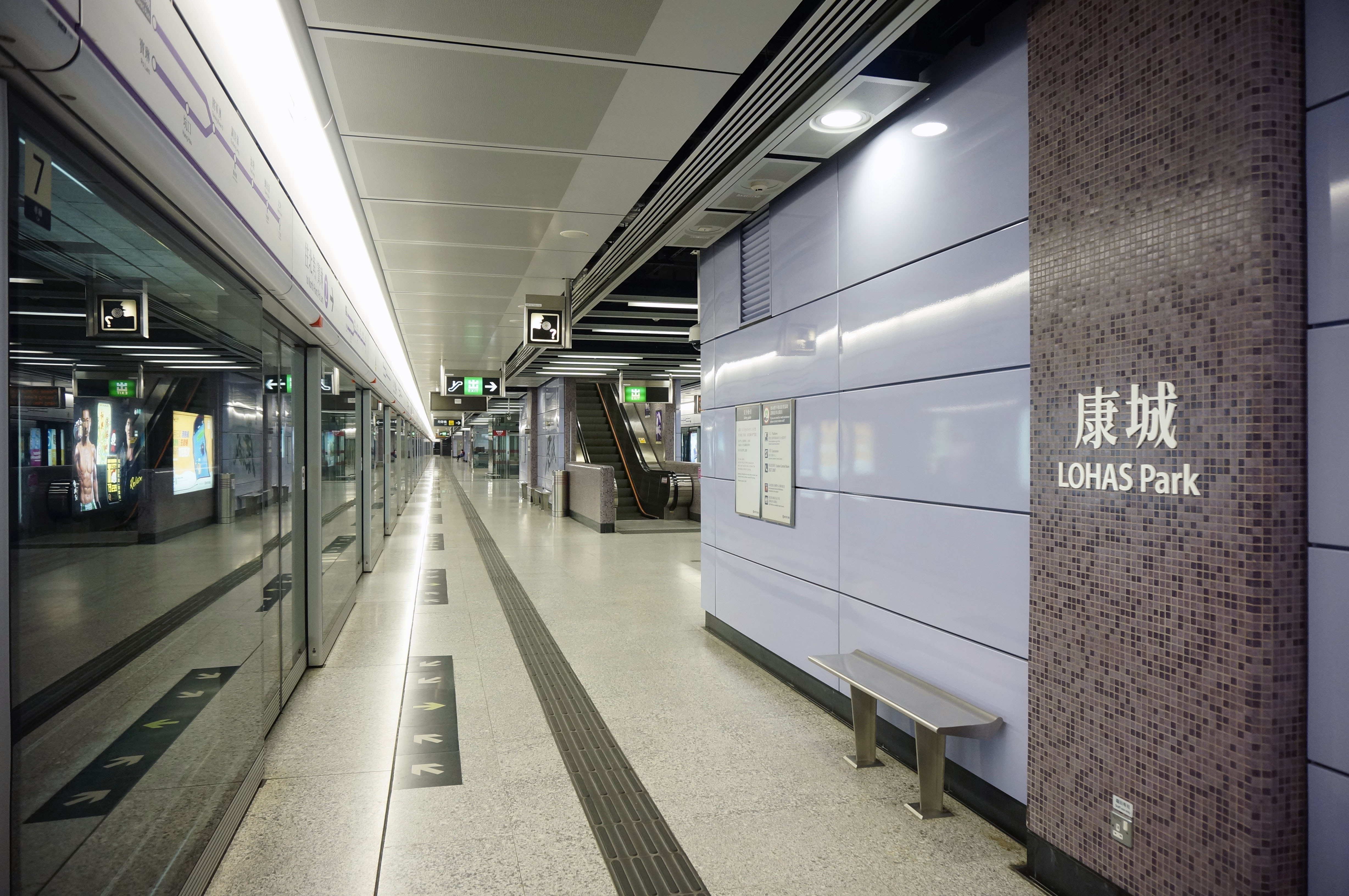 港鐵康城站月台